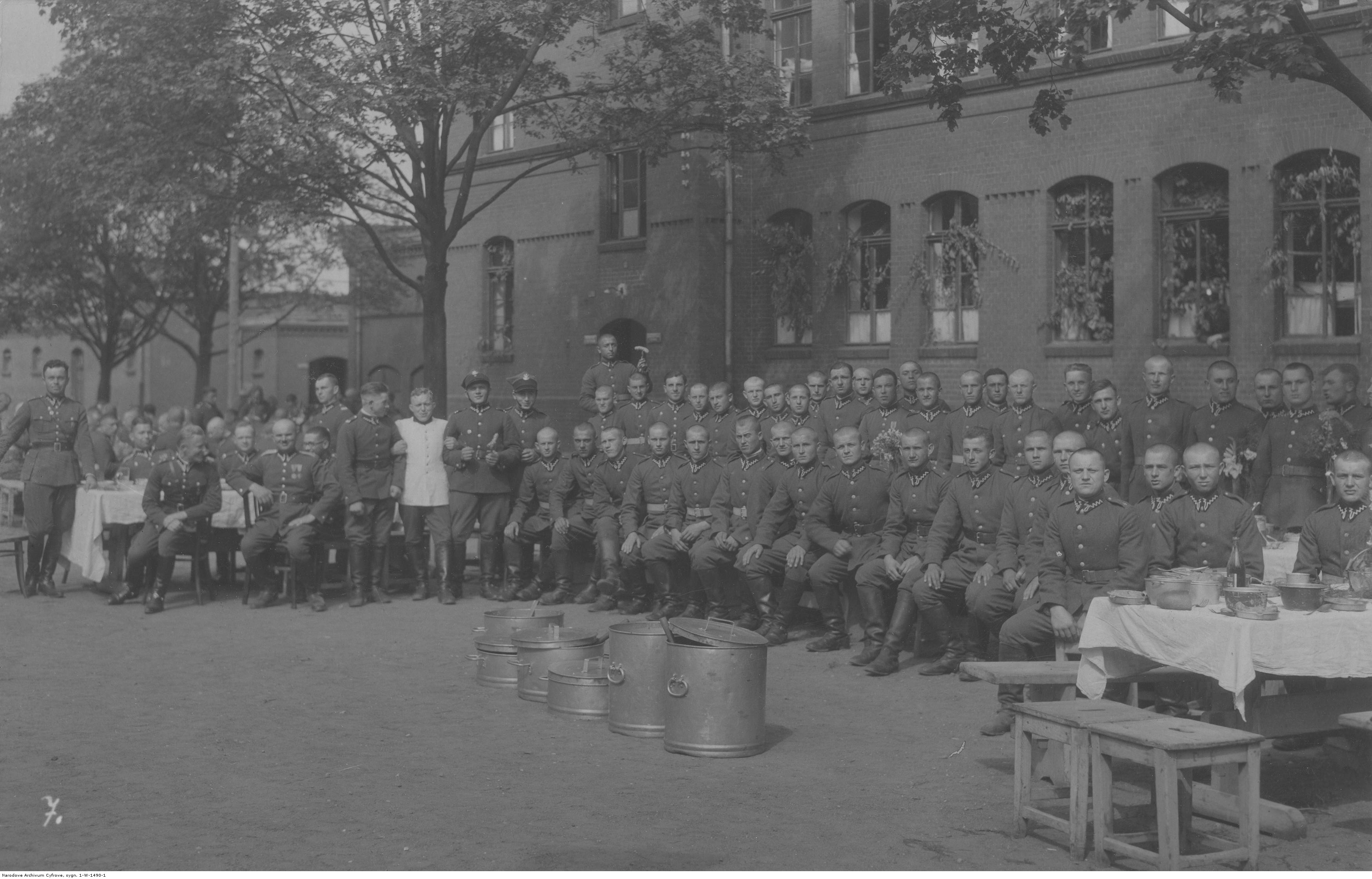 Święto 4 Pułku Artylerii Lekkiej w Inowrocławiu. Fotografia grupowa artylerzystów z 4 pal-u podczas żołnierskiego obiadu. Koncern Ilustrowany Kurier Codzienny - Archiwum Ilustracji. Sygnatura: 1-W-1490-1